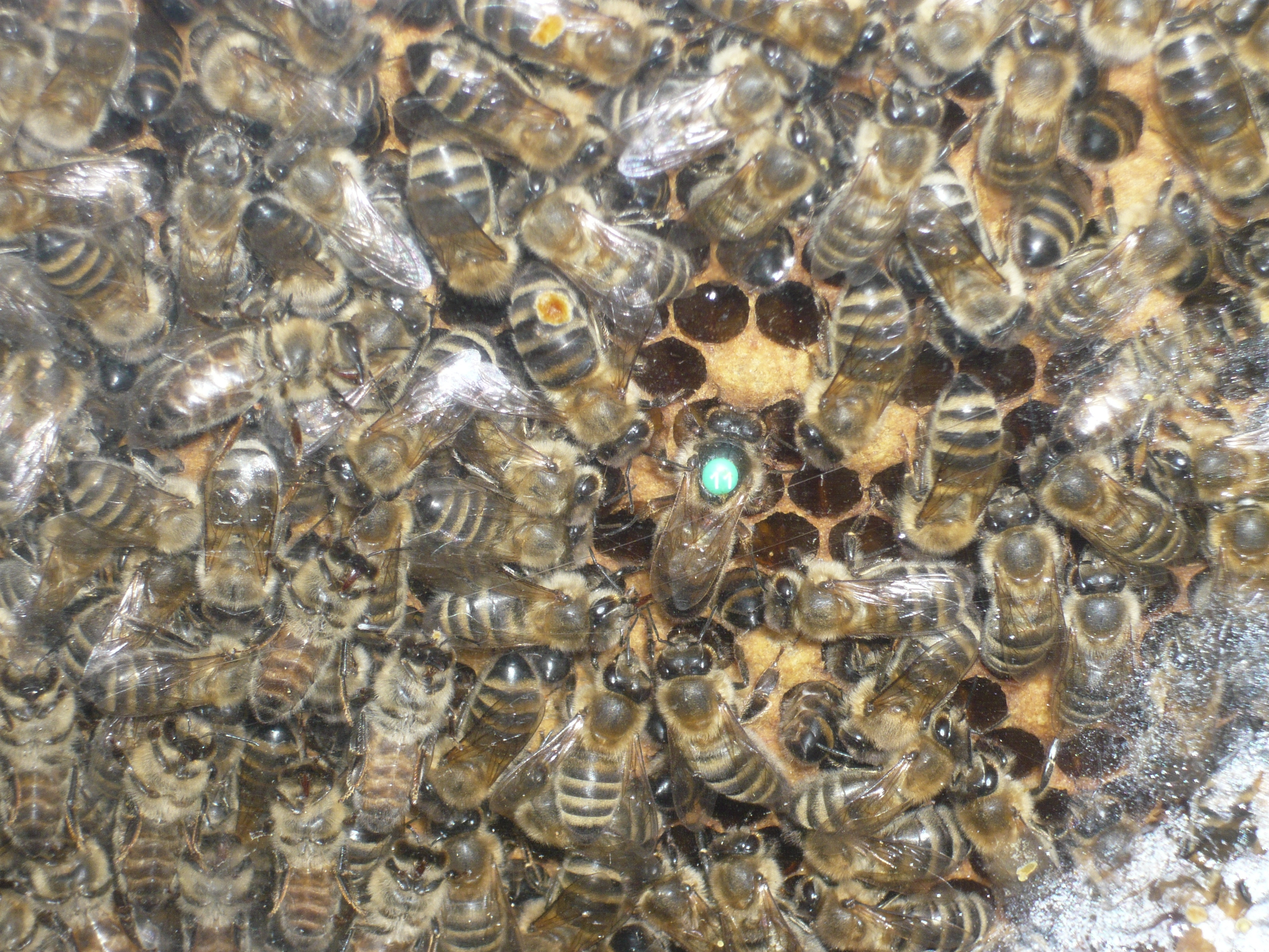 Innenansicht des Schaukastens; schön zu sehen die Bienenkönigin; Heilkräutergarten Klaffer am Hochficht